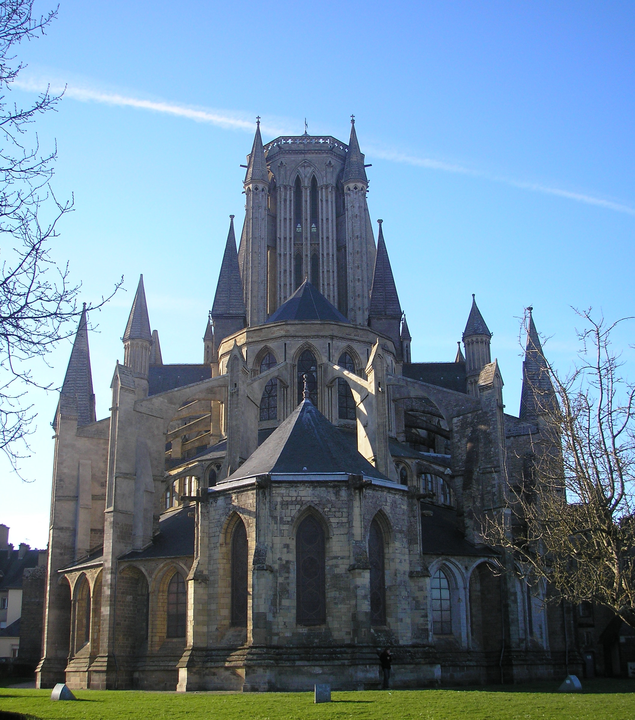 Coutances (Normandie, France). Le chevet de la cathédrale Notre-Dame.